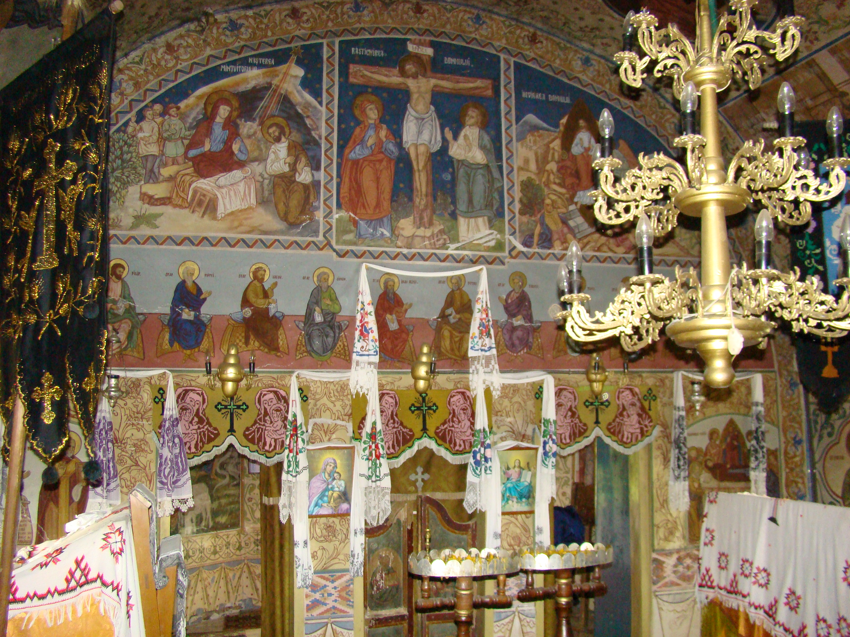 Biserica de lemn „Adormirea Maicii Domnului” din Tiulești-Hunedoara